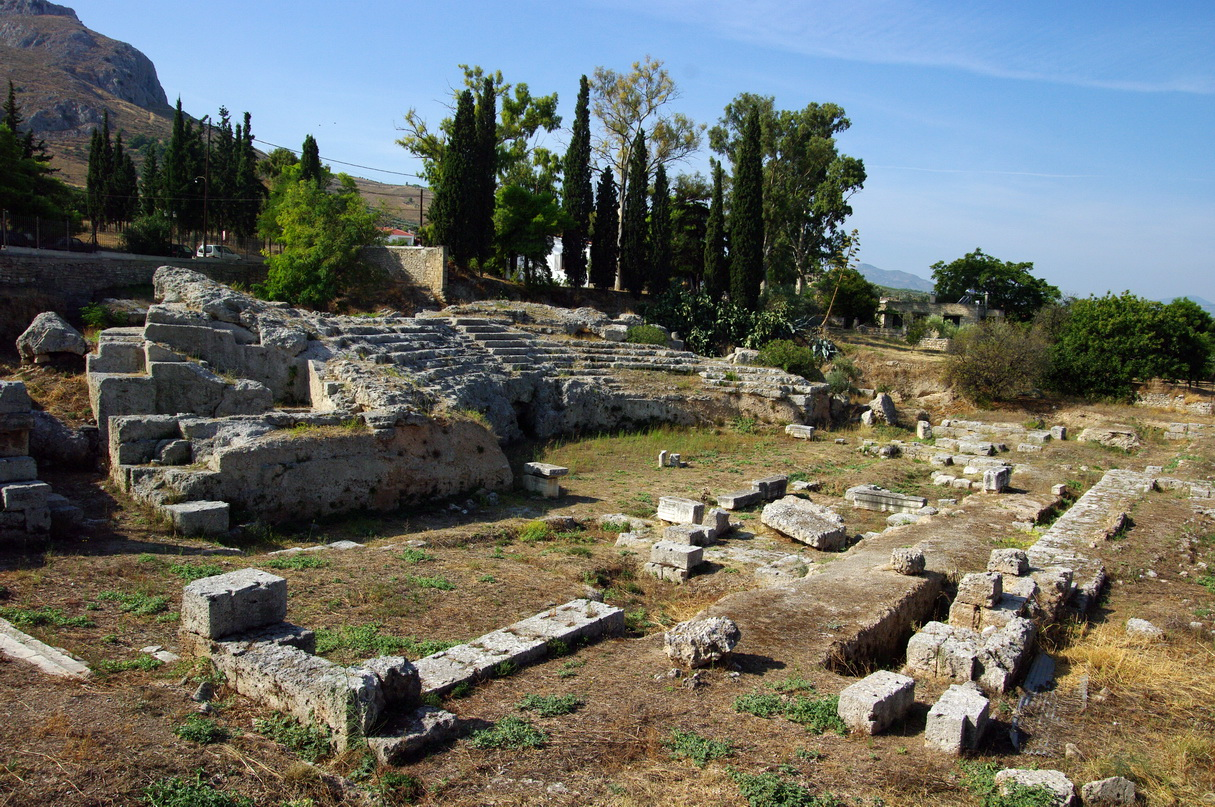 Odeon, Korinth